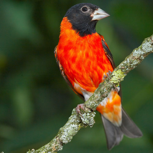 Carduelis cucullata, Macho de Cúcuta (Colombia).